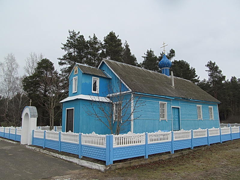 Акцябр. Царква